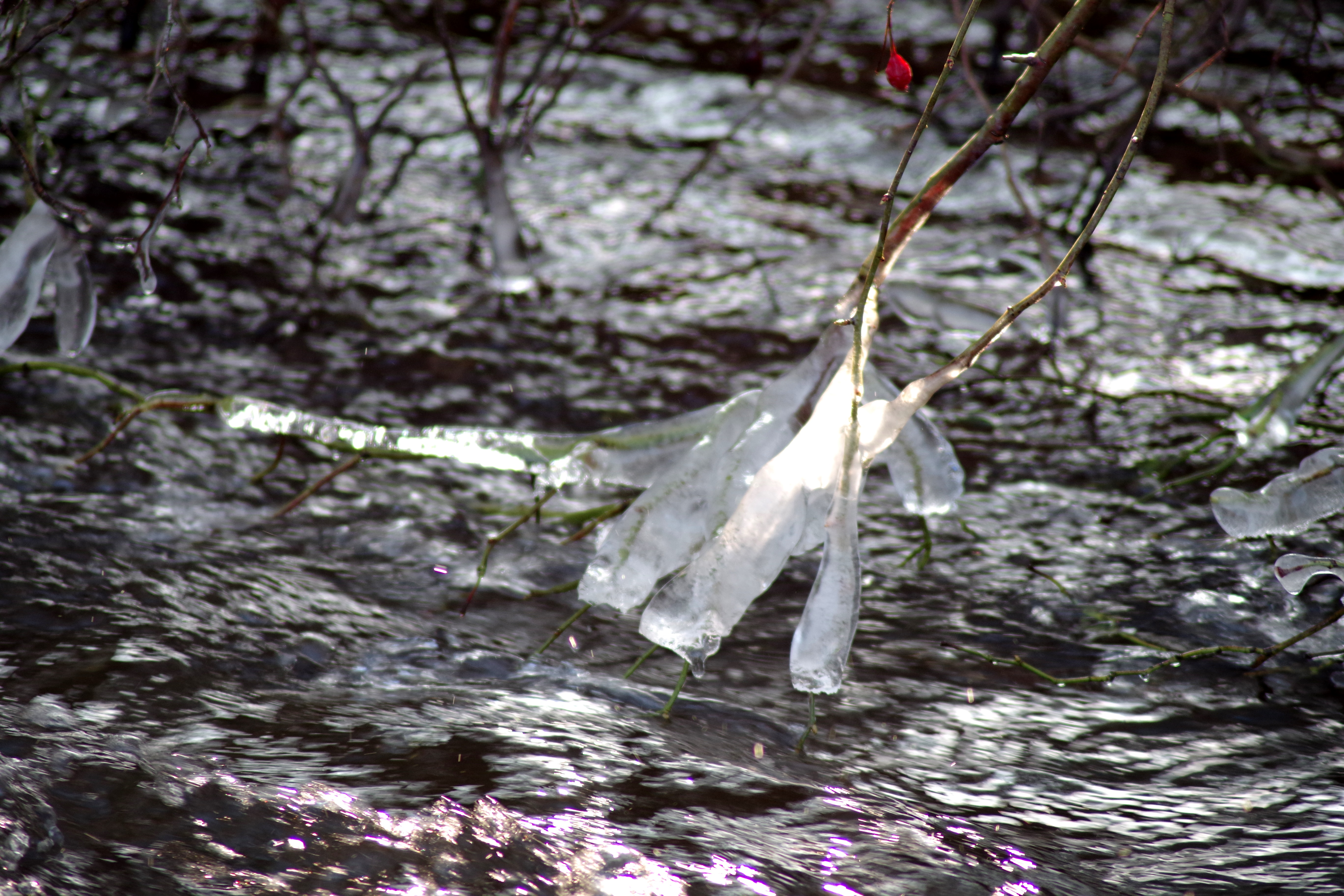 FFH Beuster (mit NSG Am roten Steine) 3825-331 - Beuster bei Söhre